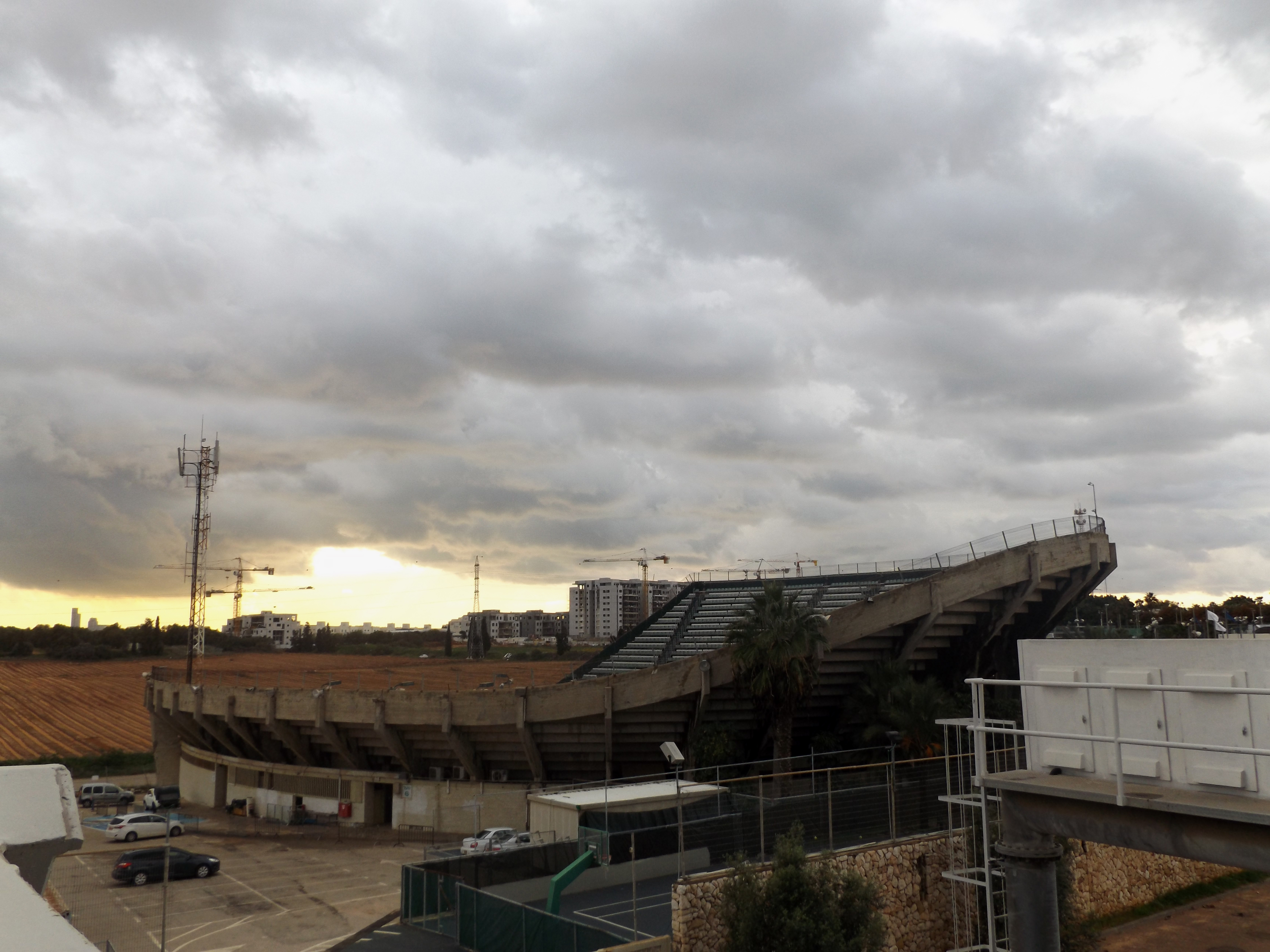 אצטדיון קנדה רמת השרון